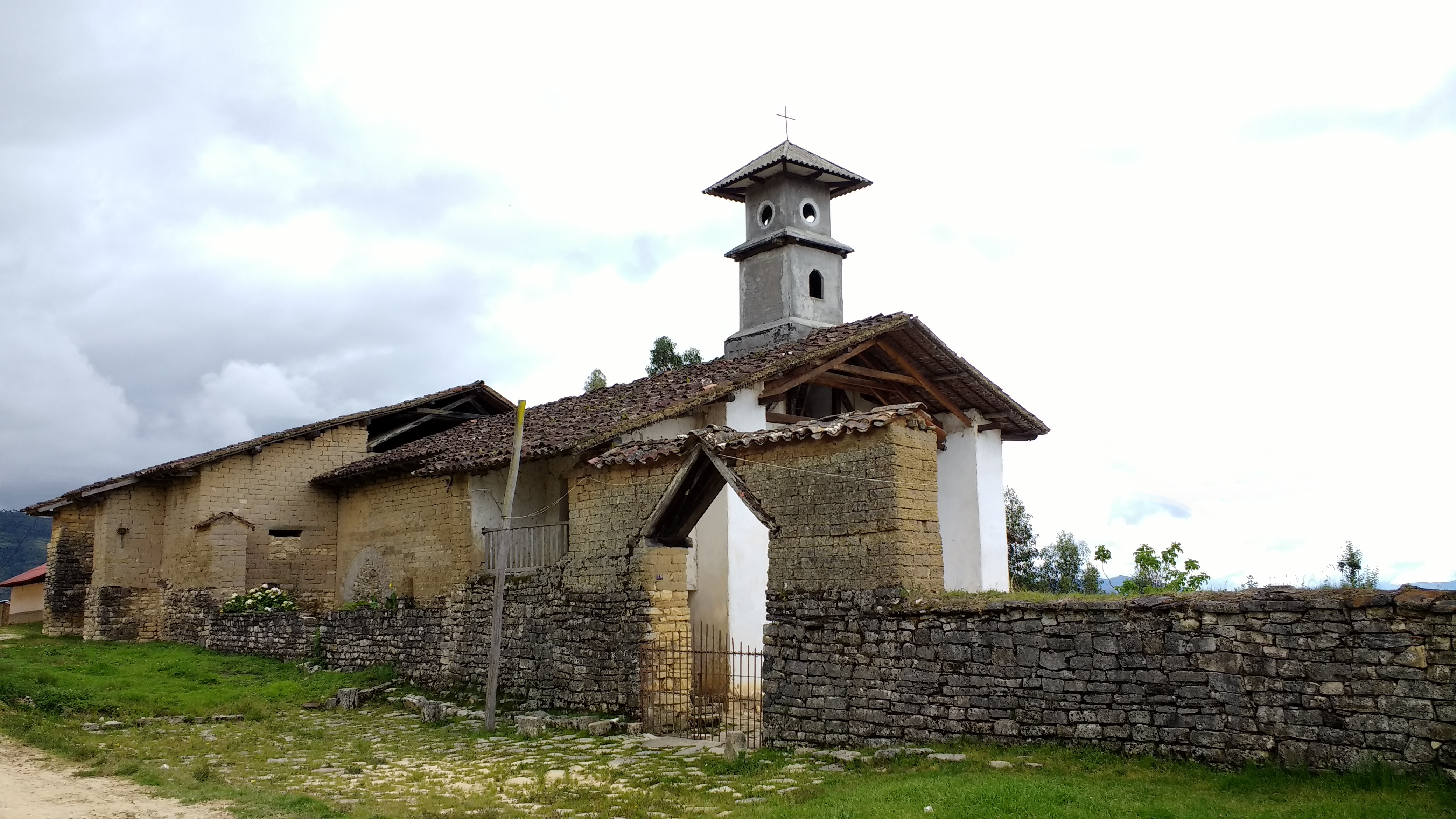 Iglesia del pueblo de Levanto